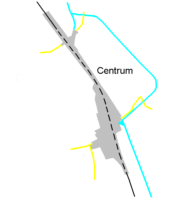 Spoorzone Delft (schematisch)